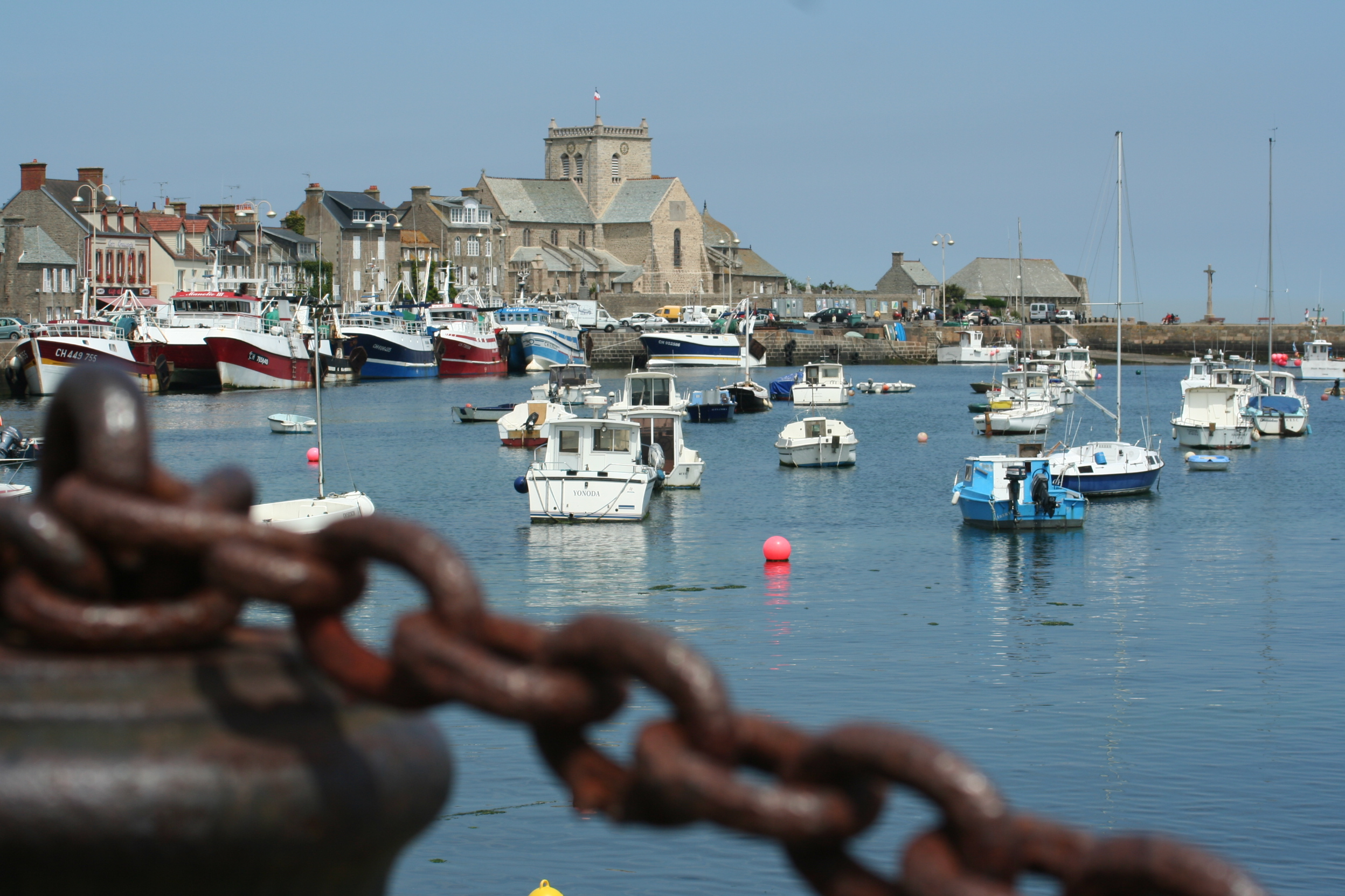 Entouré de son cimetière marin, l'édifice renferme un baleinier à trois mâts.